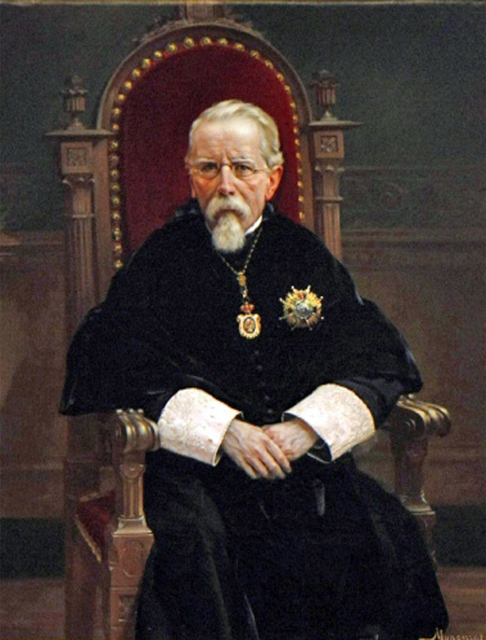 Retrat Rubió i Ors